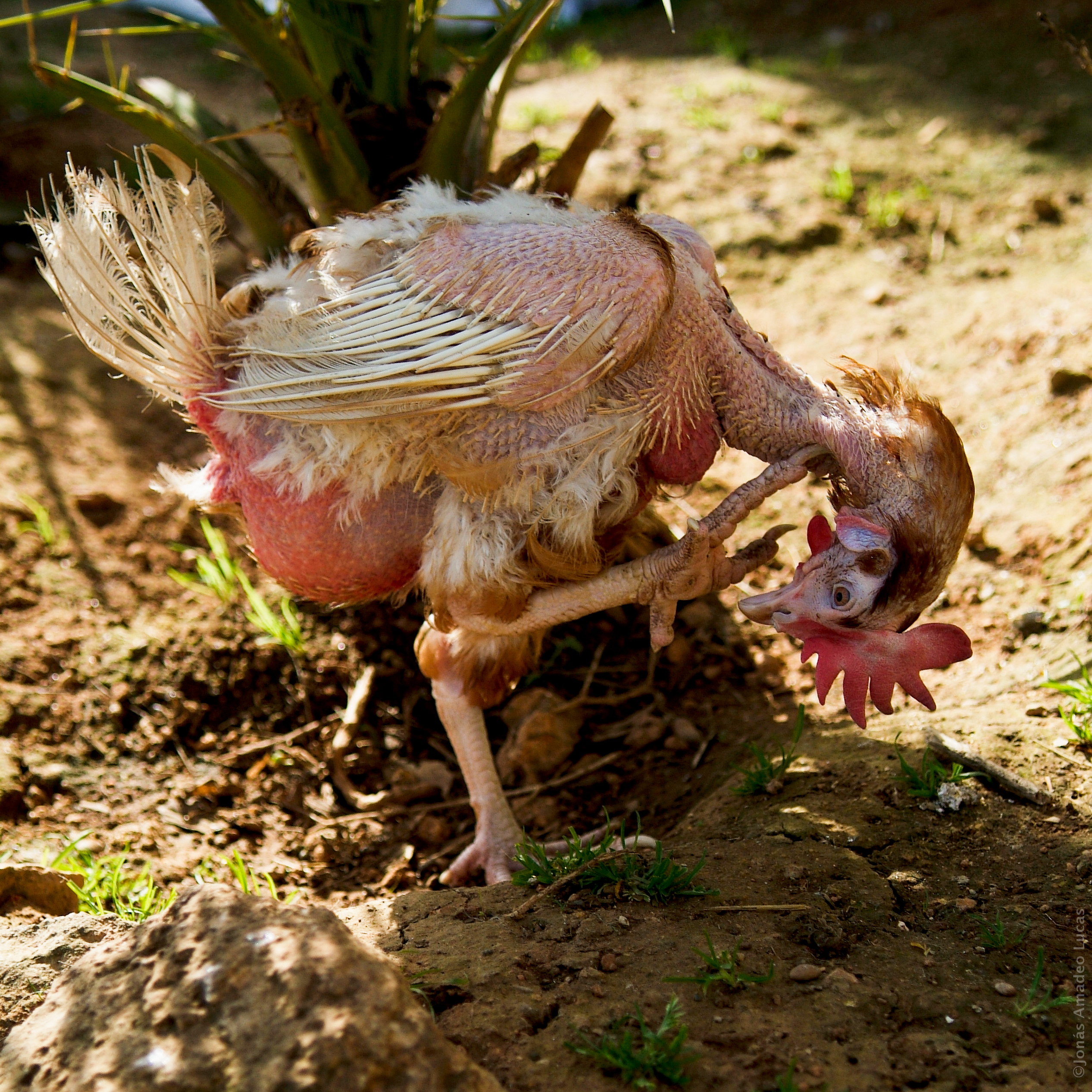 JALX12X02-3425